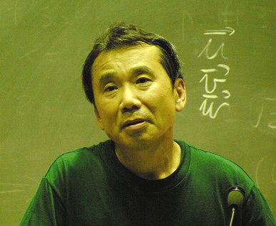 کوردی: نووسەری ژاپۆنی هارۆکی مۆراکامی